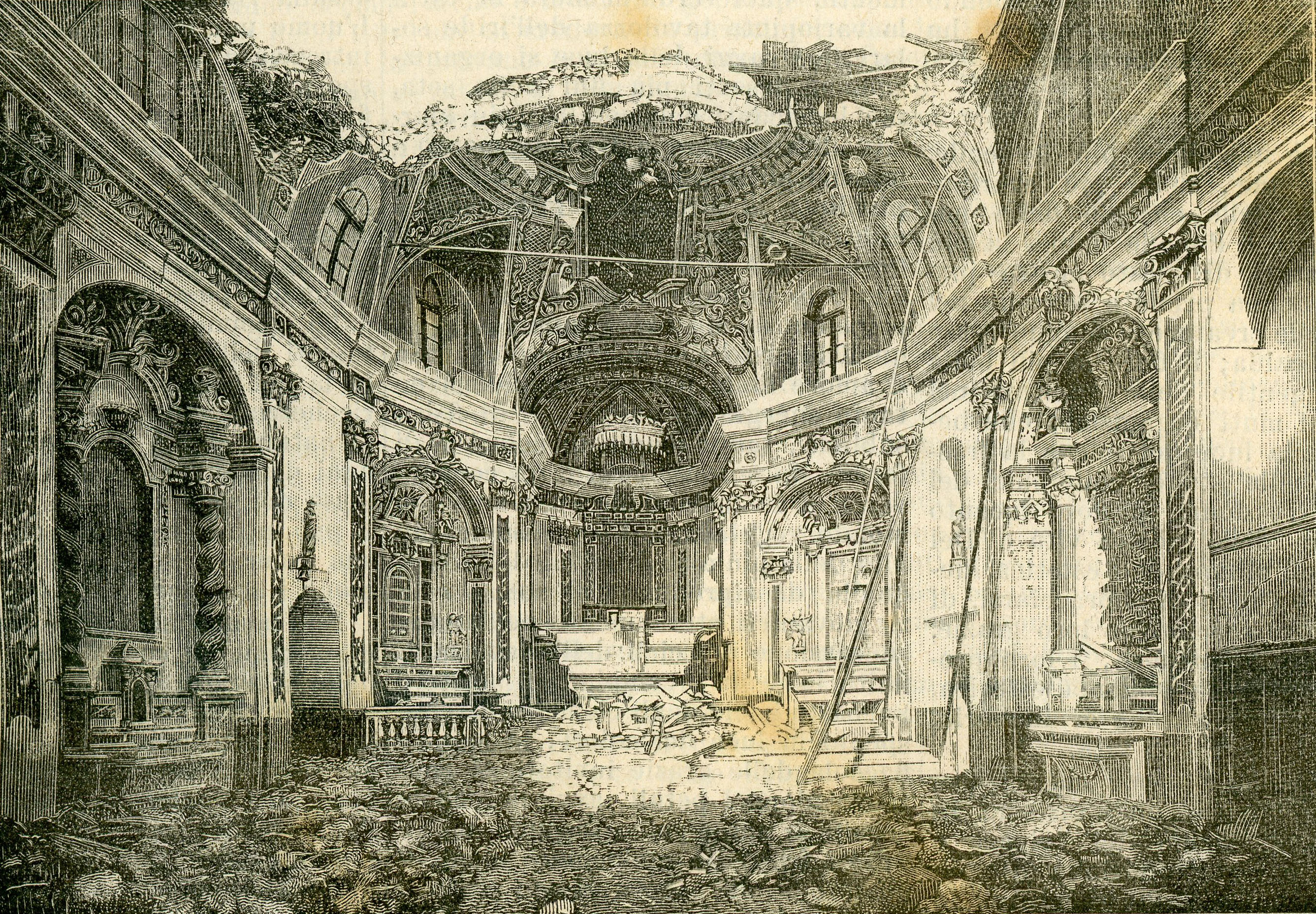 Escursioni nella Liguria colpita dal terremoto: - Aspetto presente della chiesa di Bajardo (xilografia).